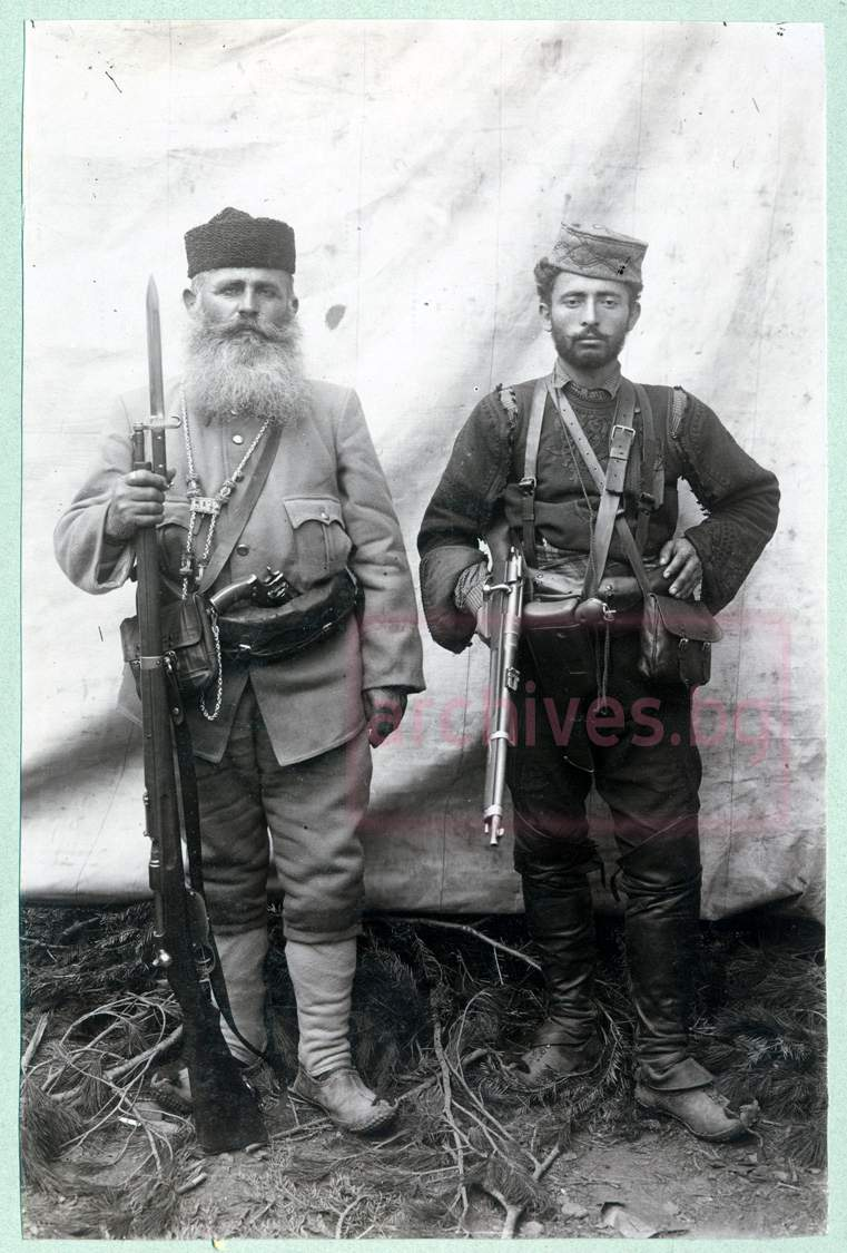 Апостол Кочкона и Иван Чакулев.